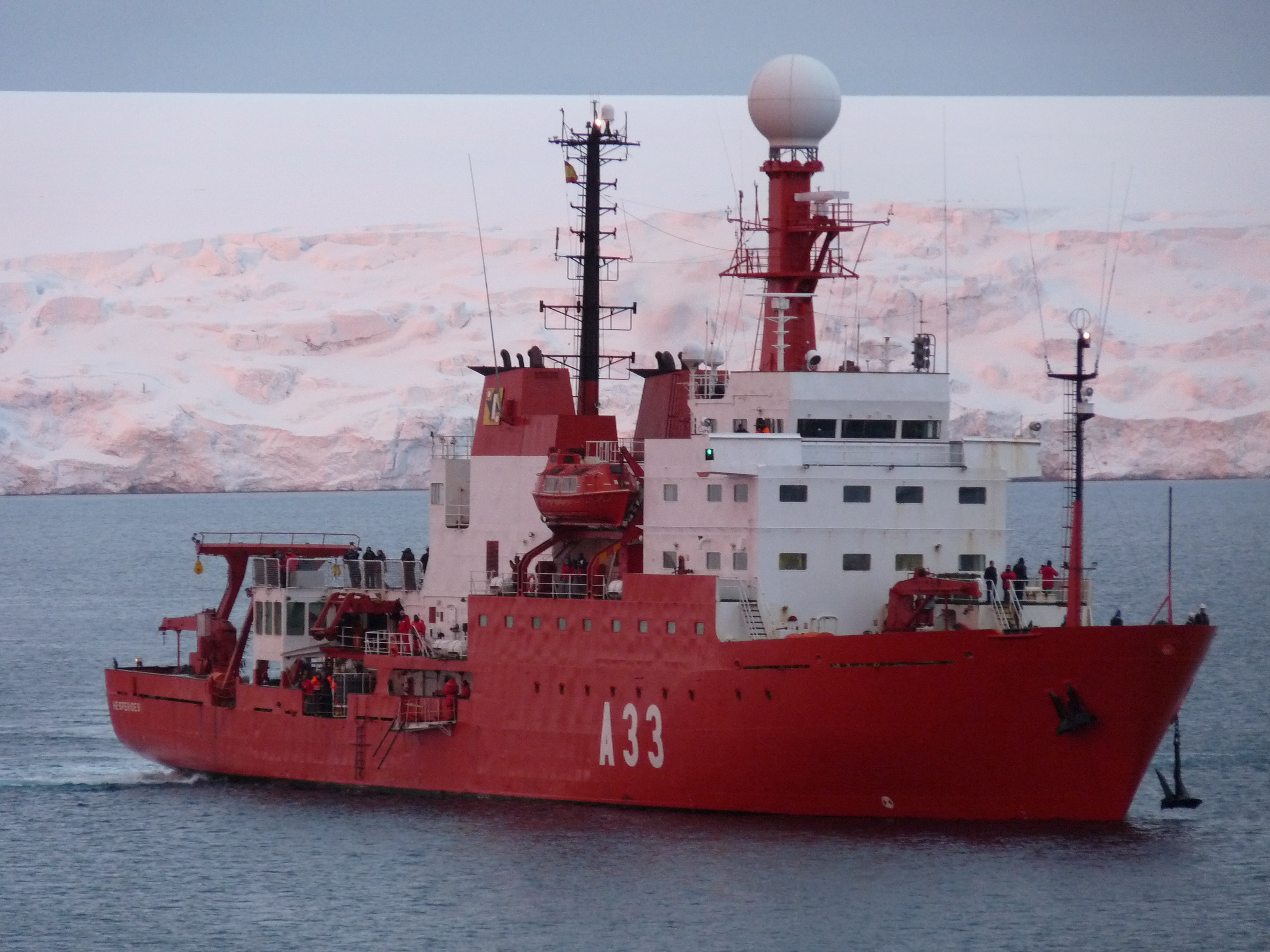 País: España Clase, [Tipo]: Bazán B-204, [AGOR]. Constructor: Bazán, Cartagena, España. Fecha botadura: 3 de diciembre de 1990. Fecha alta: 16 de mayo de 1991. Desplazamiento ( toneladas ): 2.738 a plena carga. Dimensiones ( metros ): 82,5 x 14,3 x 4,5 Propulsión: 4 x diesels MAN-Bazán 14V20/27 ( 6.860 cv ). Velocidad ( nudos ): 15. Autonomía ( millas ): 12.000 a 13 nudos. Dotación: 39 ( 9 oficiales ) mas 30 científicos. Rádar: Superficie: Racal/Hispano ARPA 2690, banda I; Navegación: Racal 2690 ACS, banda F. Helicóptero: Puede operar con un AB212 o similar. Indicativo: EBBW Base: Cartagena.